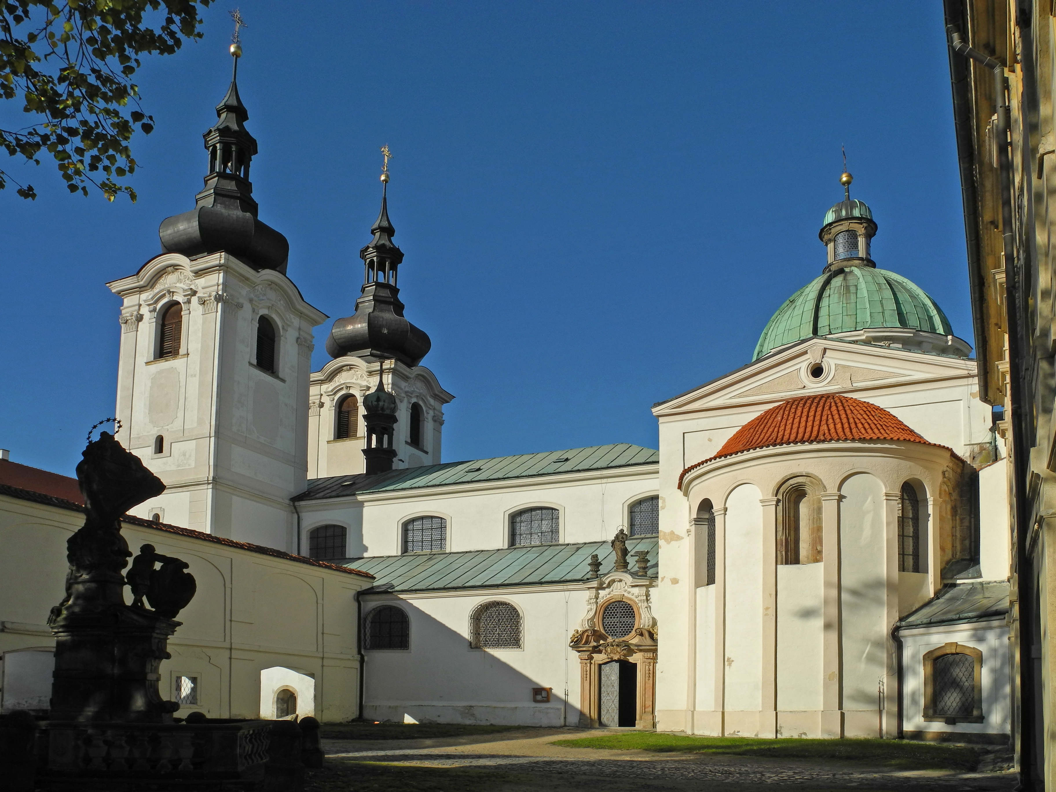 Stiftskirche Geburt der Jungfrau Maria im Prämonstratenserinnenkloster Doxan (Doksany)